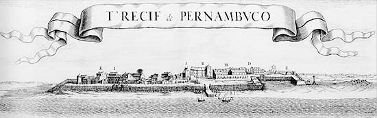 Image de Recife au XVIIe siècle.